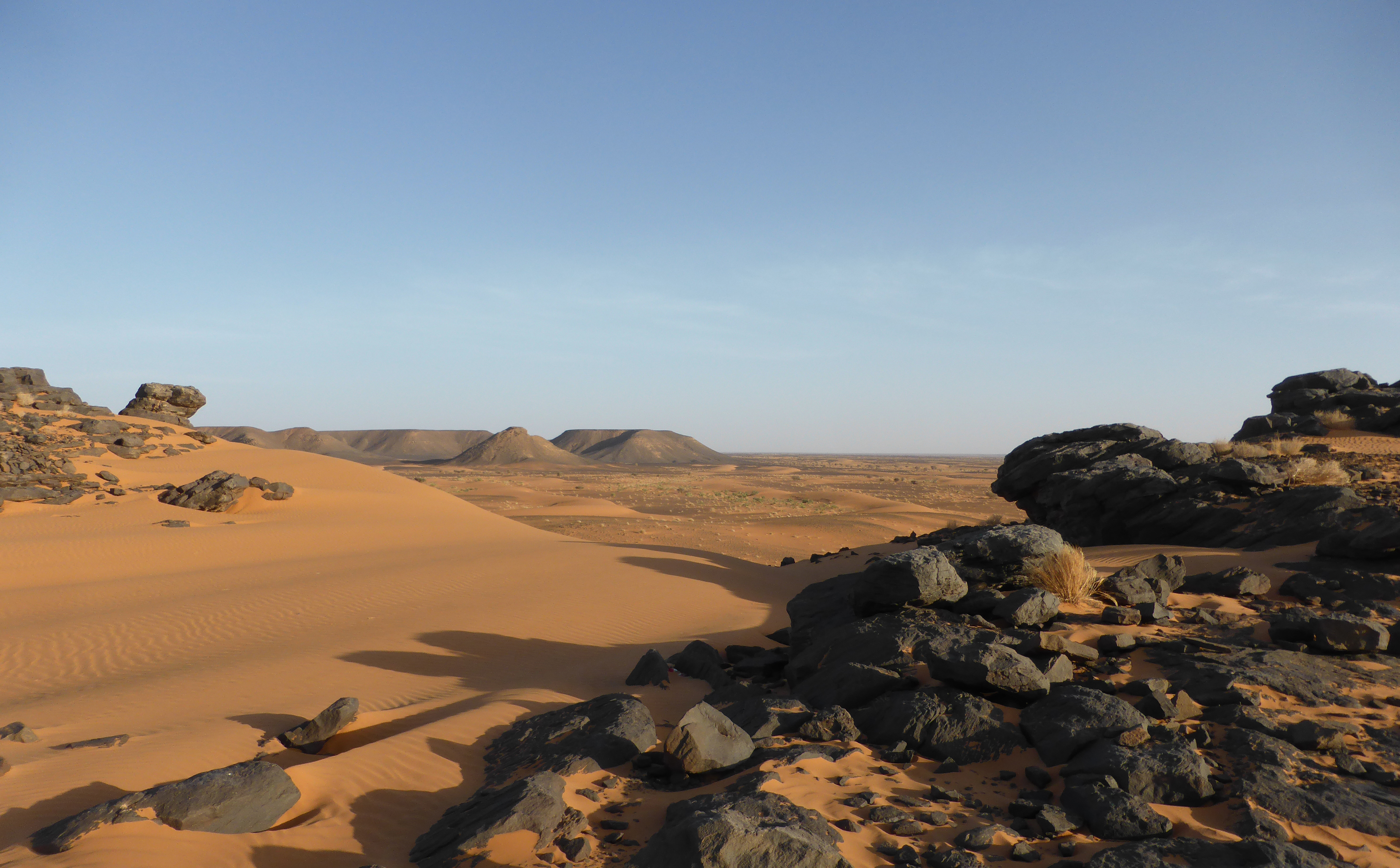 Barren landscape